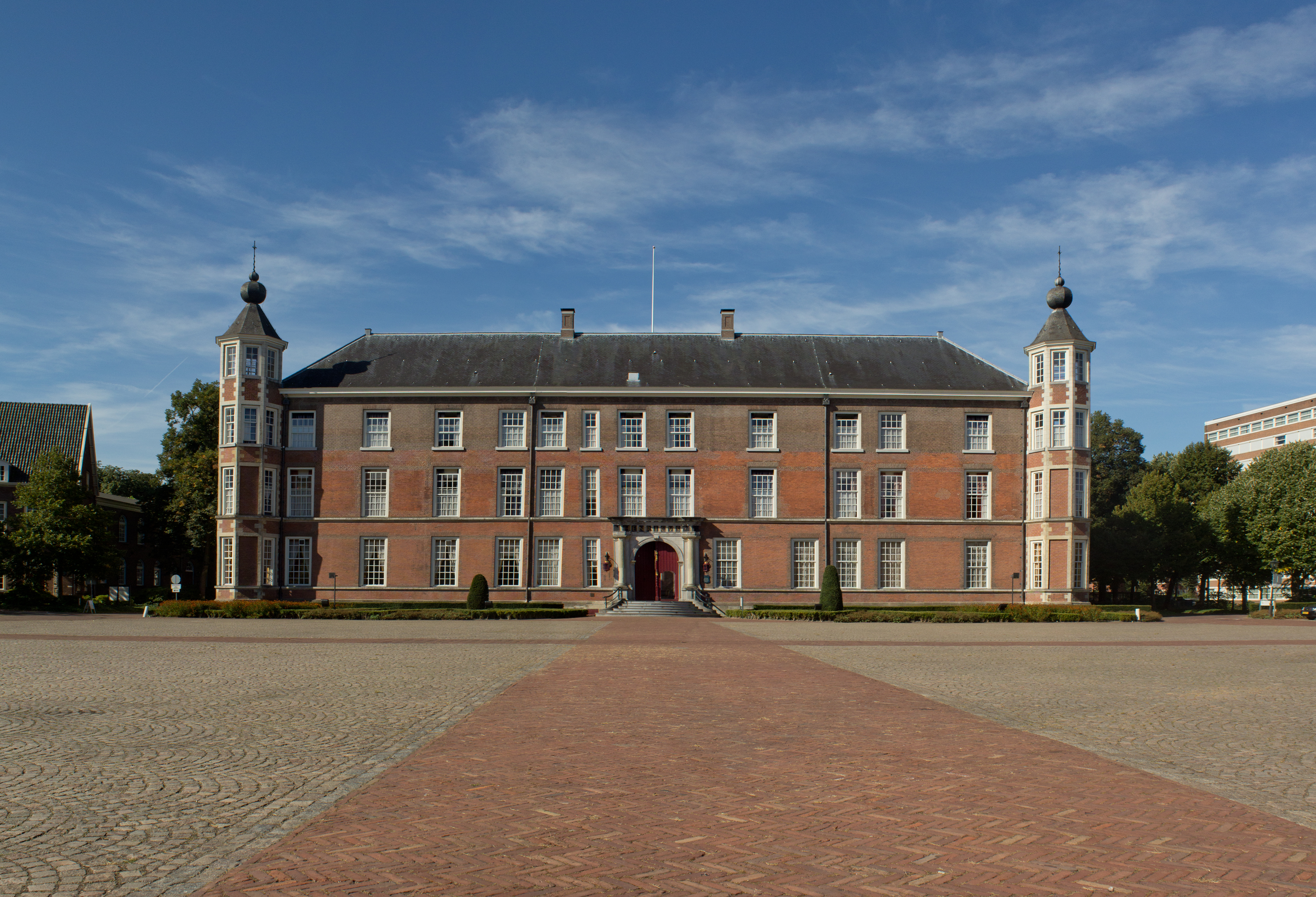 Zicht op een deel van het kasteel van Breda gevestigd in het centrum van Breda